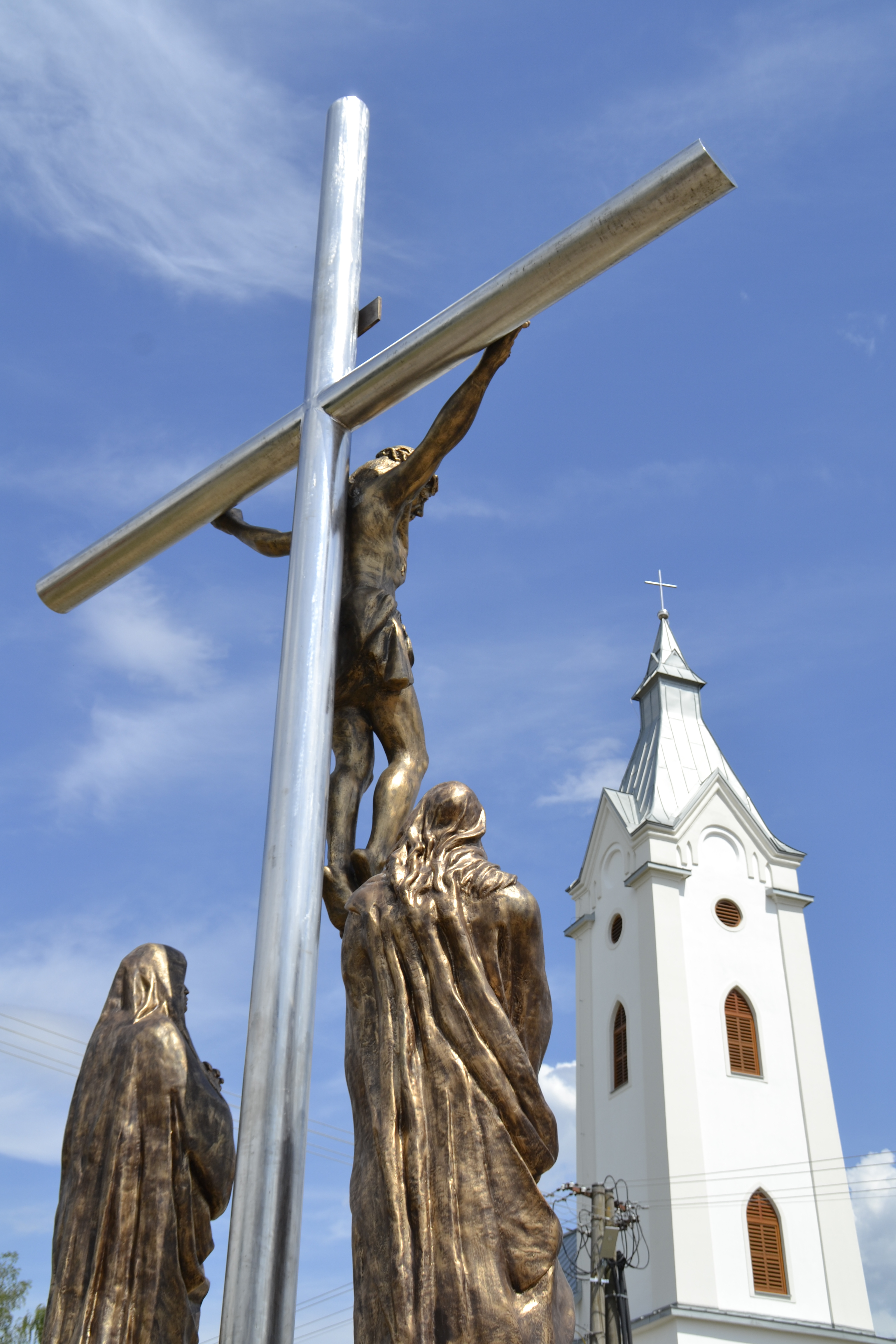 Kalvária na Námestí Jána Tomka